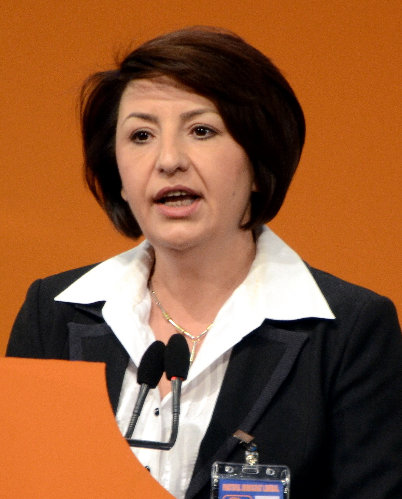 Sulfina Barbu (la Convenția națională extraordinară a Partidului Democrat-Liberal, 23 martie 2013)